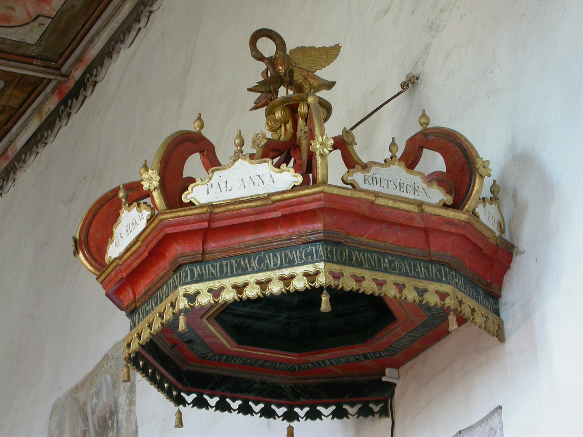 Ansamblul bisericii reformate, sec. XIII-XIX